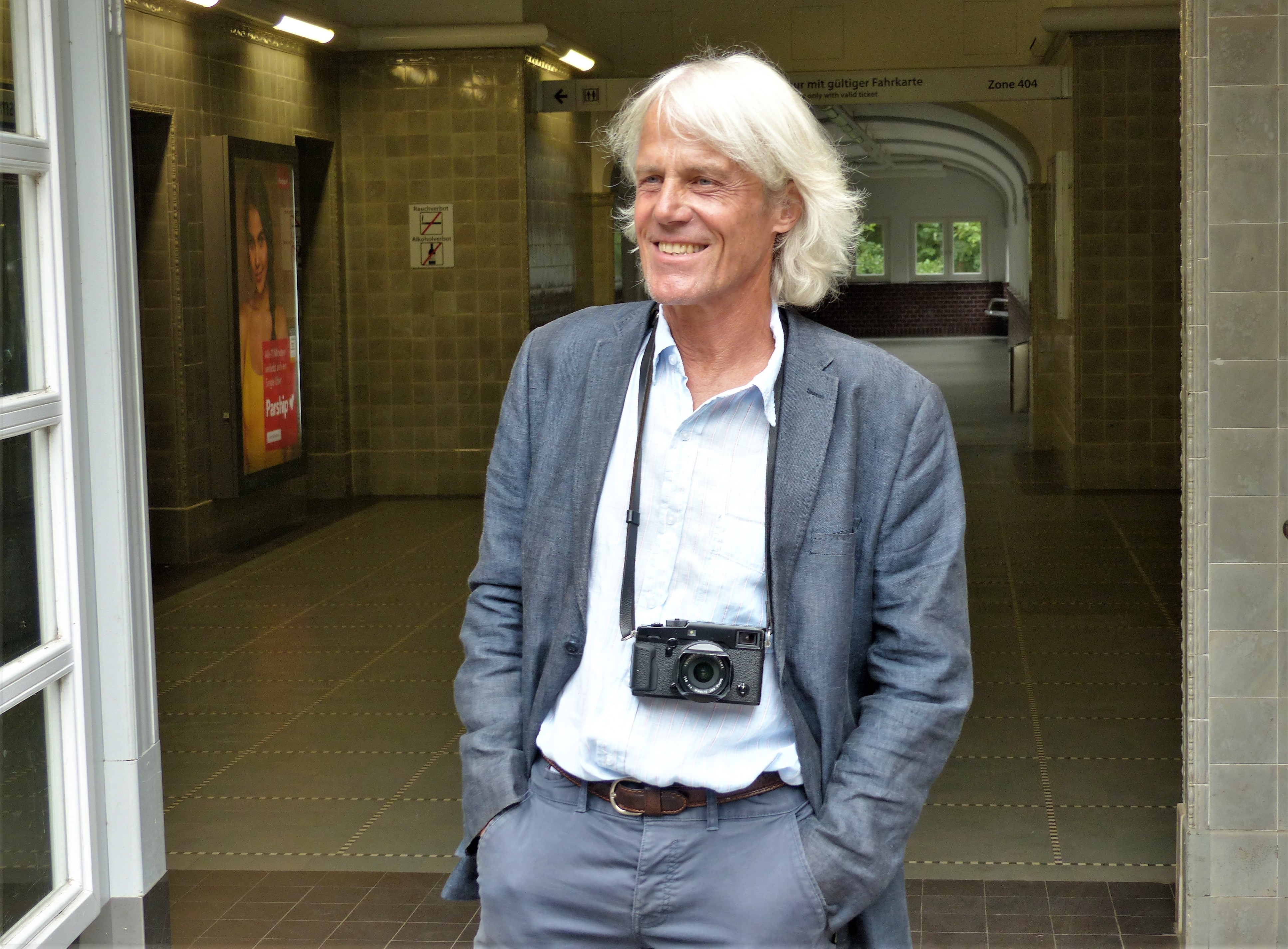 Christian Irrgang bei einem Fotoshooting in Hamburg August 2020